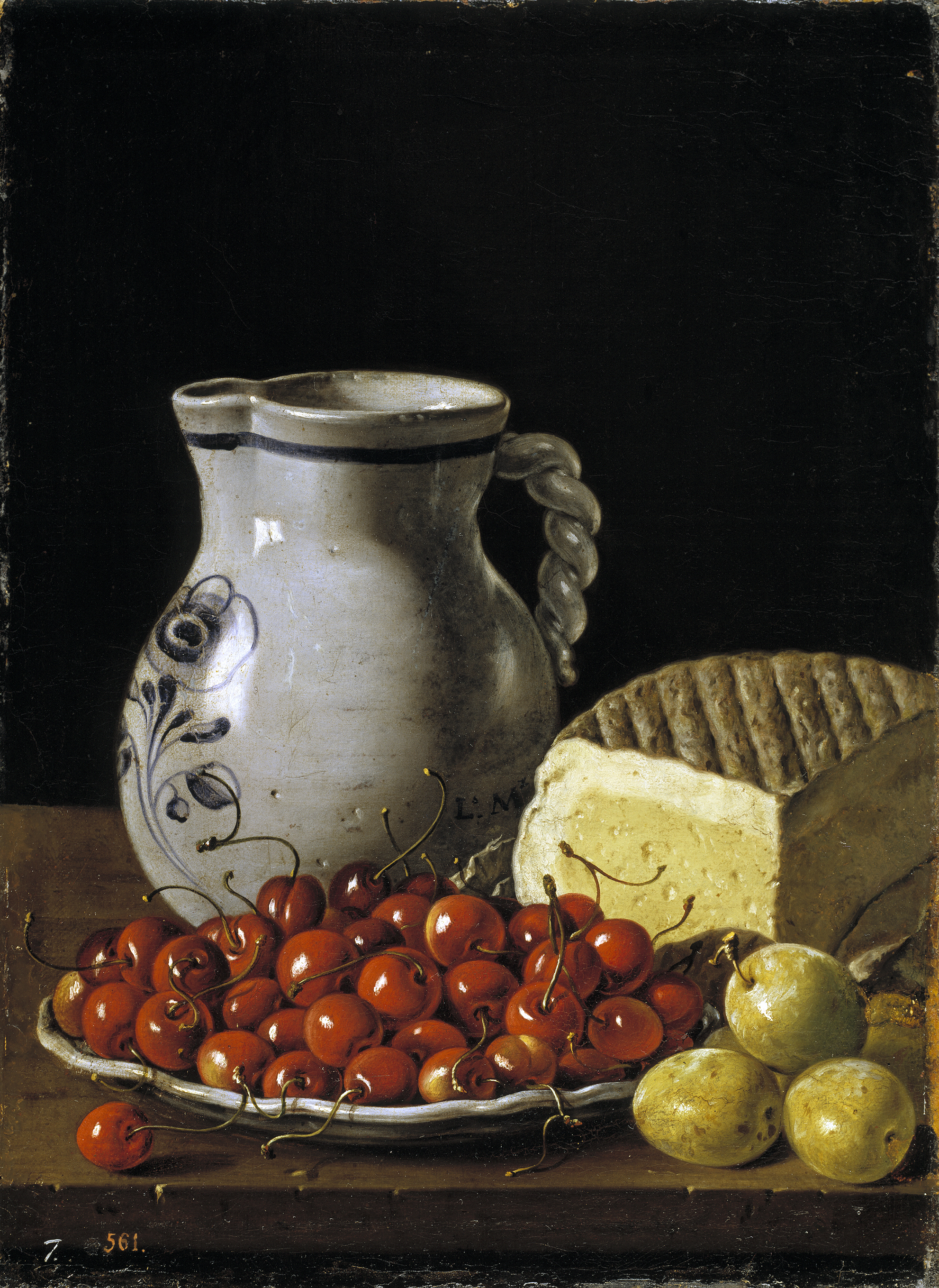 Natura morta amb cireres, prunes, formatge i gerra, pintura a l'oli per Luis Eugenio Meléndez al Museu del Prado. Madrid